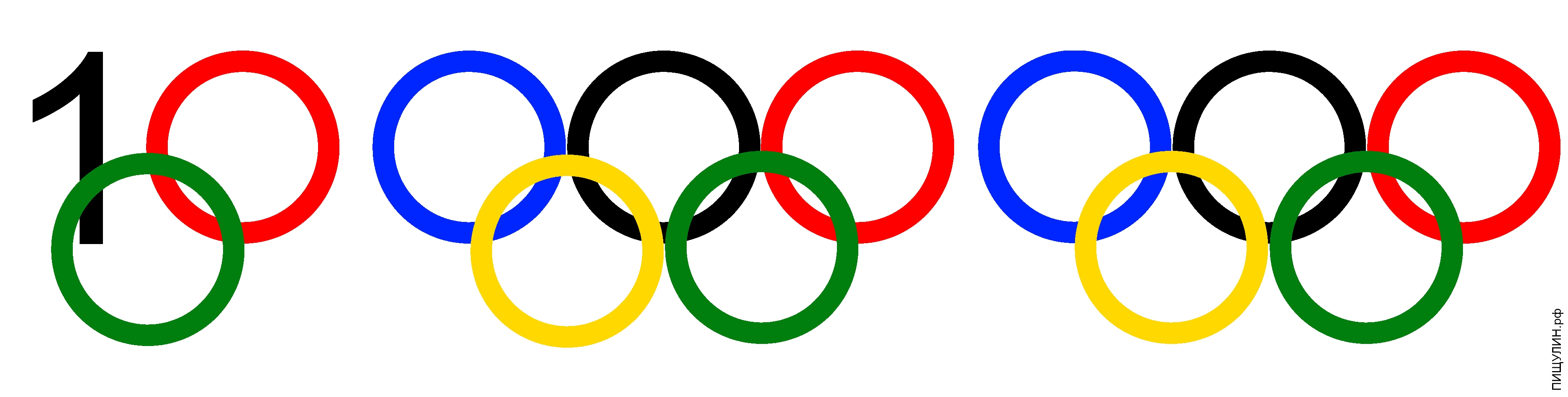 Затраты на олимпиаду превысили 1 триллион рублей